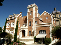 Sede de los Servicios Centrales de la Consejería de Medio Ambiente y Ordenación del Territorio de la Junta de Andalucía, y se encuentra en la Avda. Manuel Siurot de Sevilla